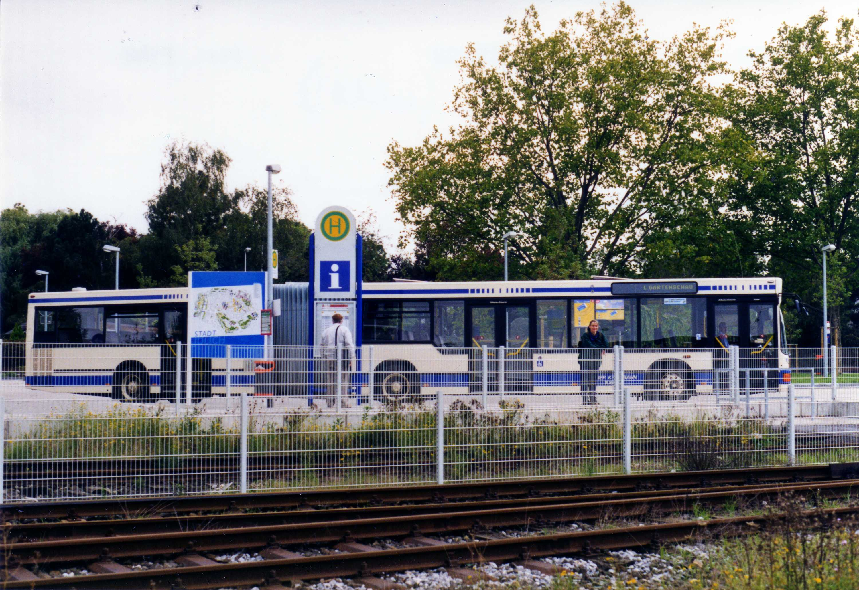 1998 fand die Landesgartenschau in Jülich statt, und der neue Zentrale Omnibus-Bahnhof (ZOB) direkt neben der Rurtalbahn-Station ging in Betrieb. Hier einer der Shuttlebusse mit der Zielaufschrift "L. GARTENSCHAU".